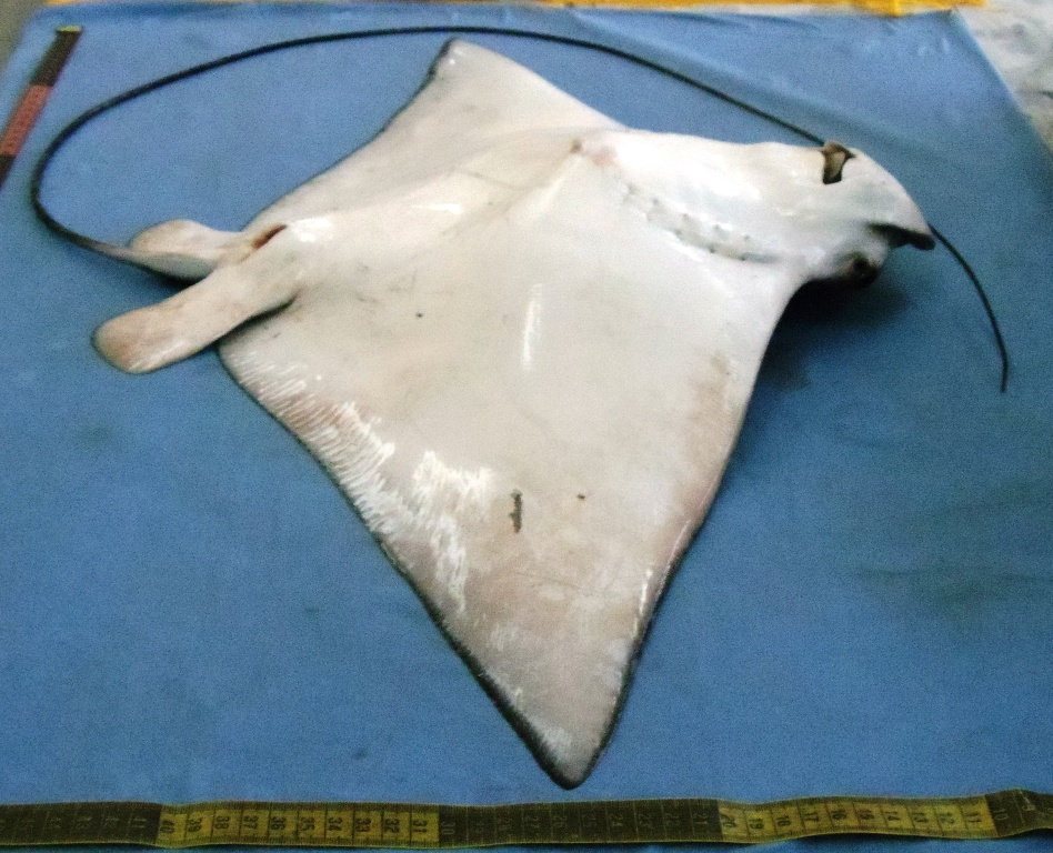 Скат рода пятнистых орляков